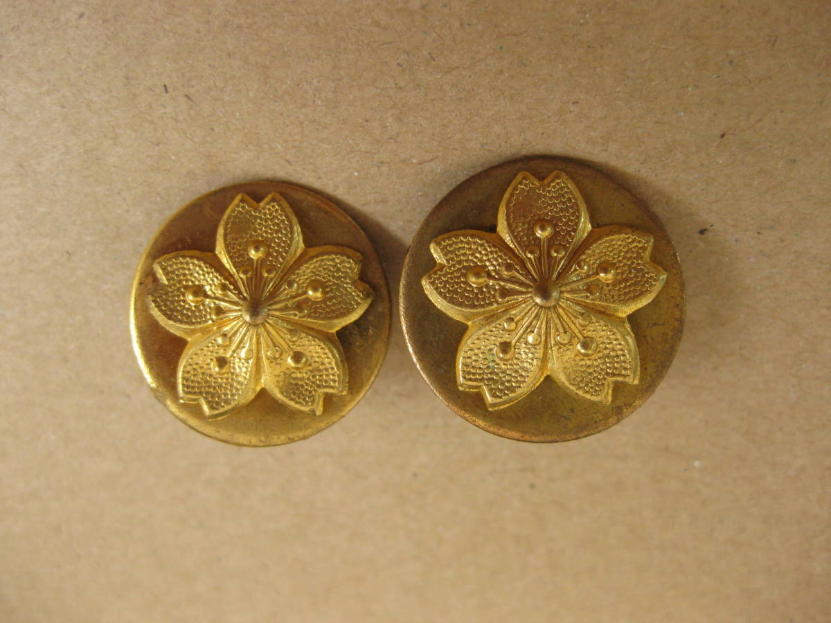 幹部候補生き章